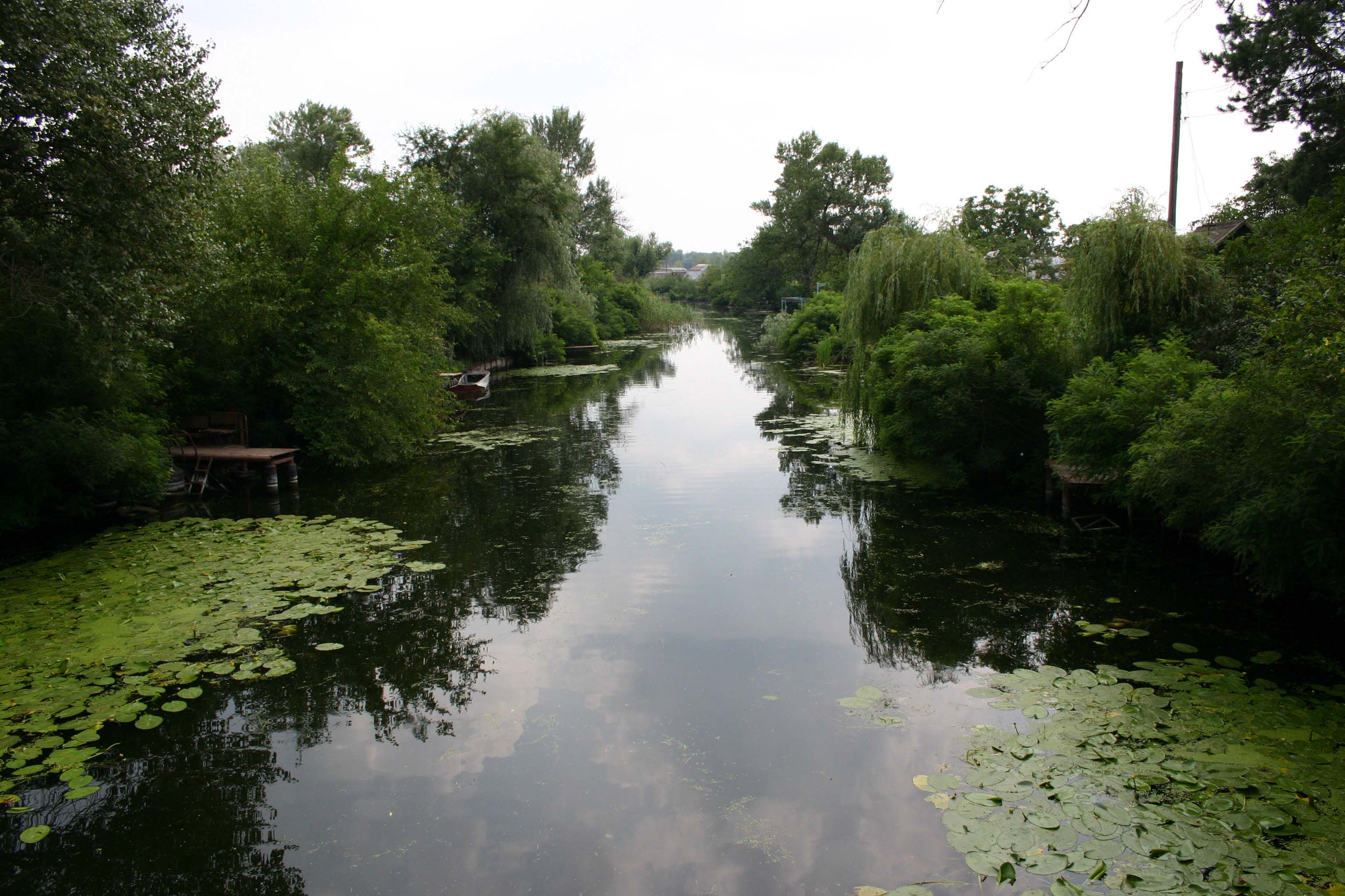 Einer der vielen Seitenarme des Dnepr im Delta bei Cherson